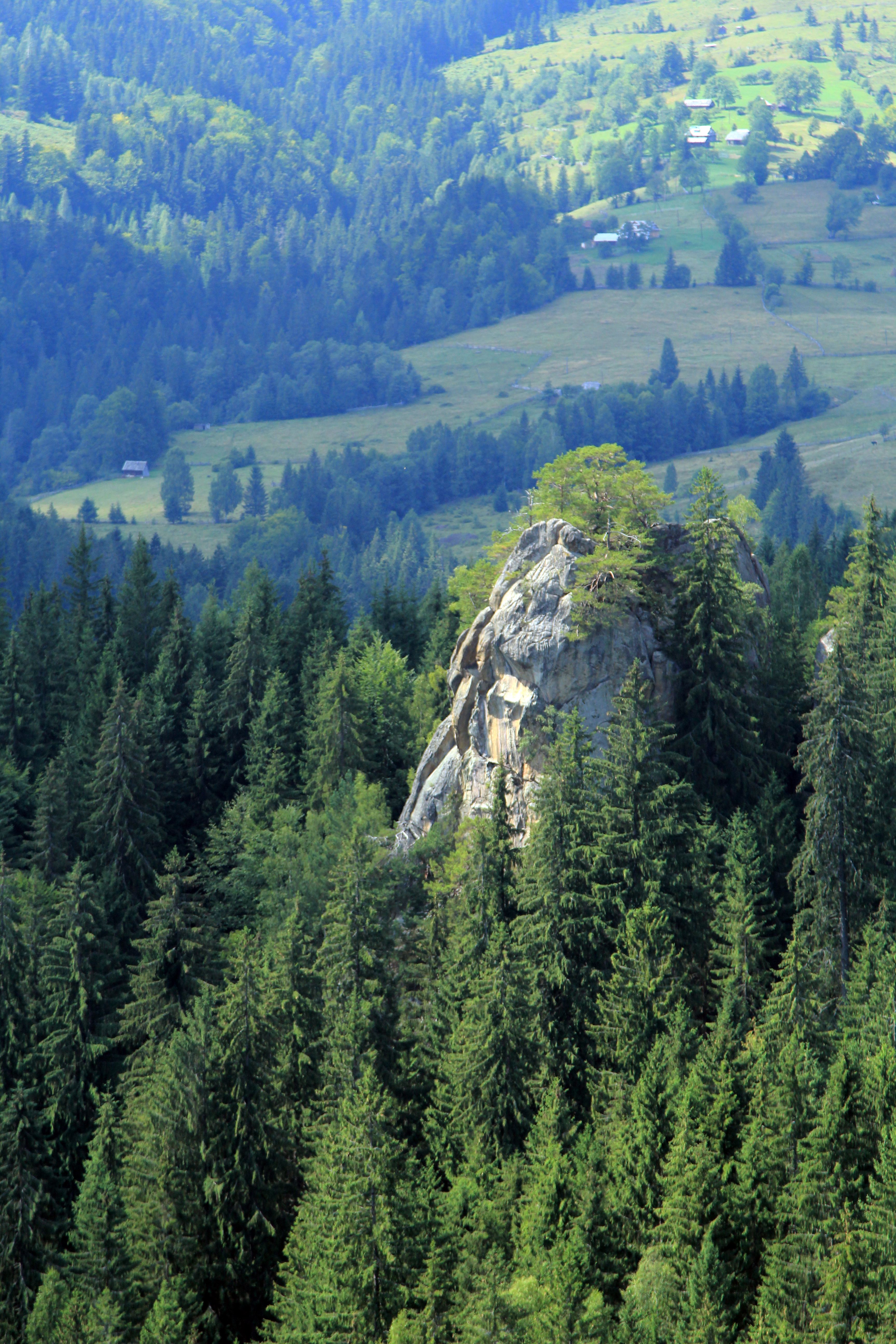 «Терношори», Косівський район, Яворівське лісництво, кв. 26